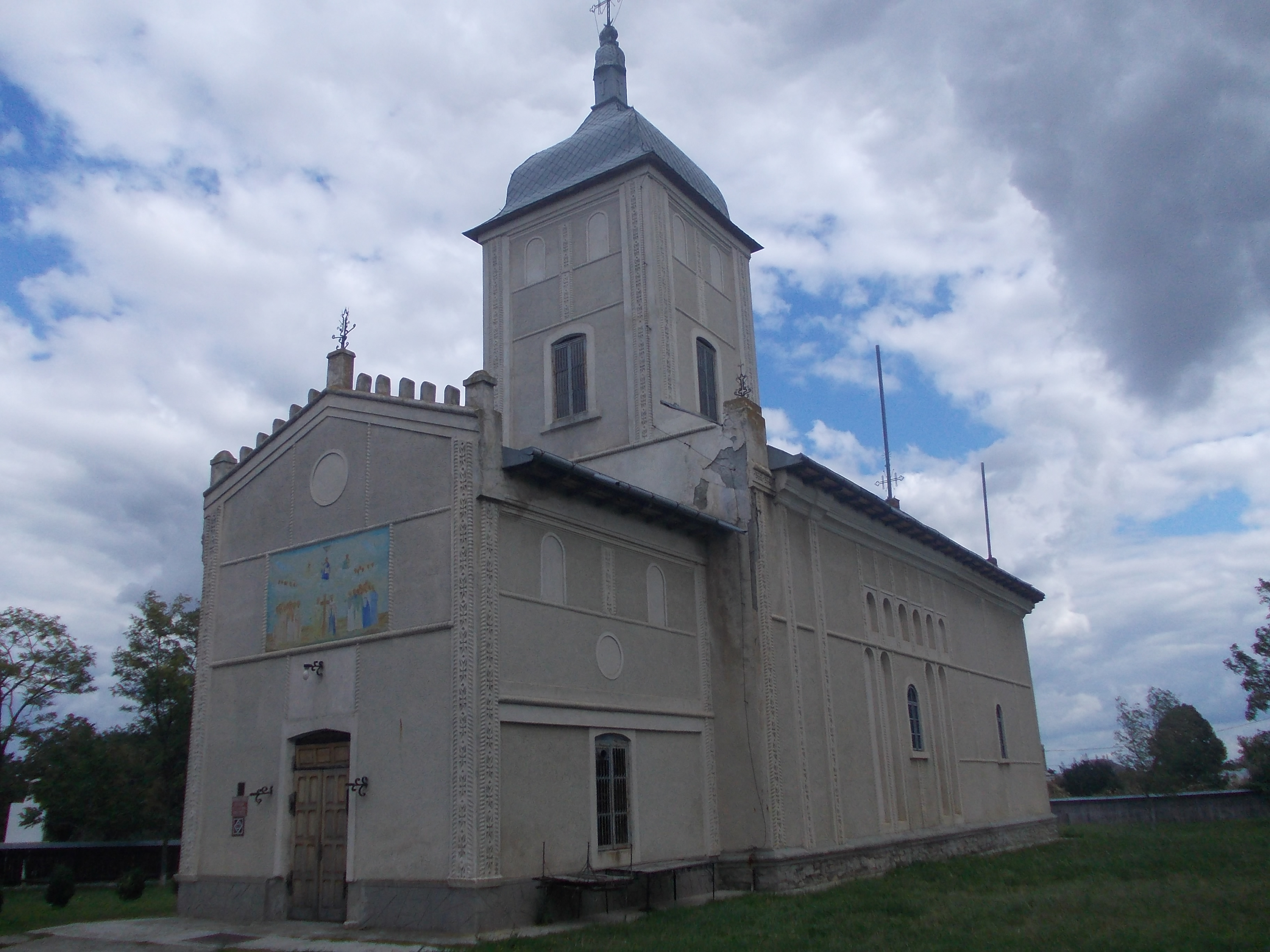 Biserica "Duminica Tuturor Sfinților" sat Miron Costin, jud. Neamţ